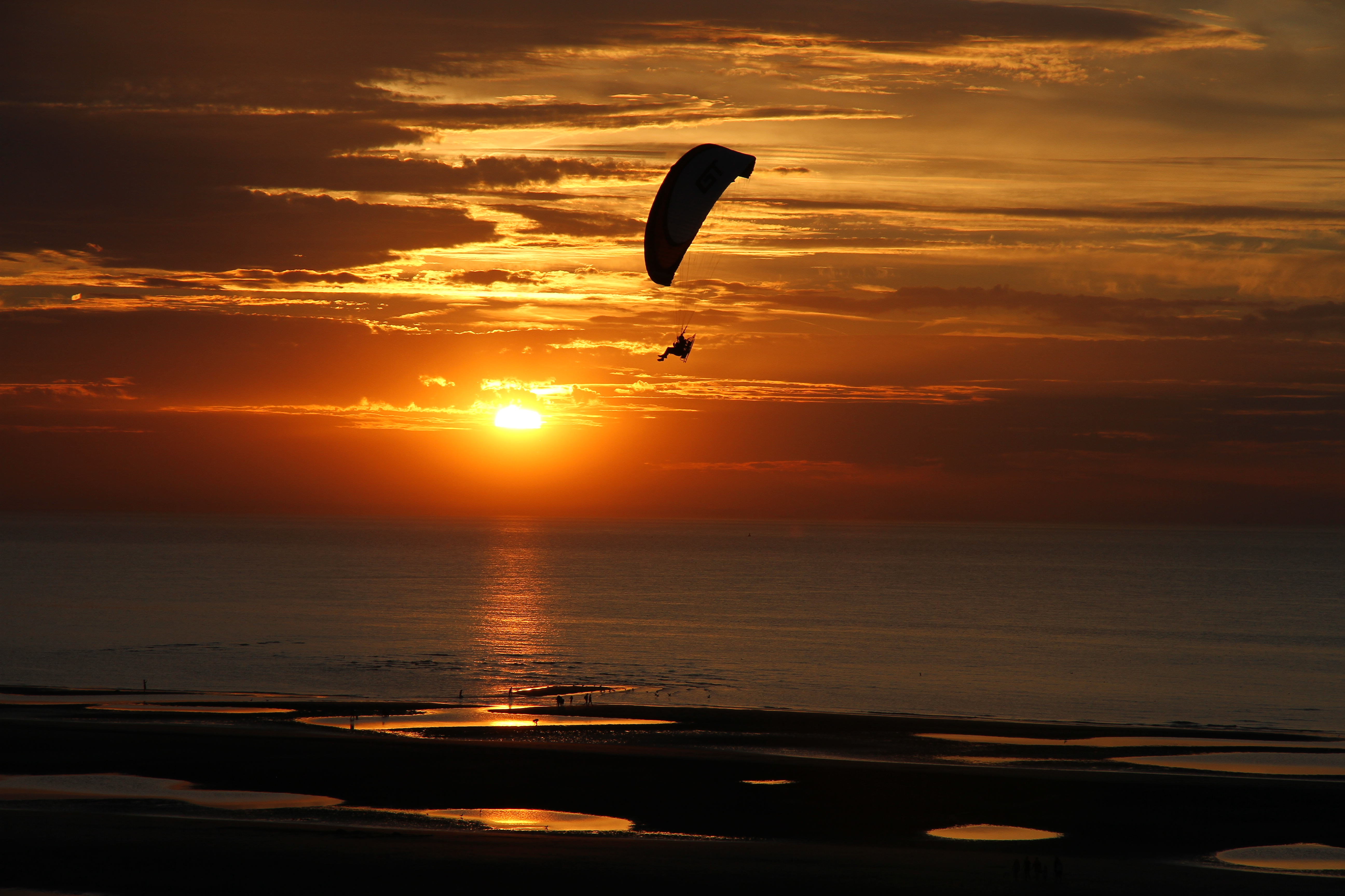 Soleil couchant vu d'un appartement le long de la digue, à Koksijde - Coxyde, Belgique